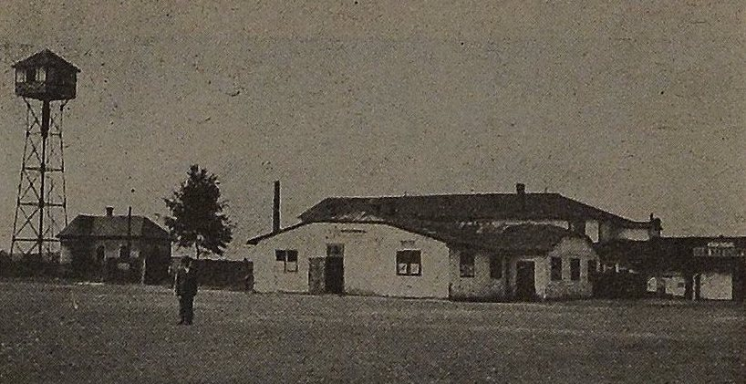 TG Sokół Dziedzice dom narodowy 1930